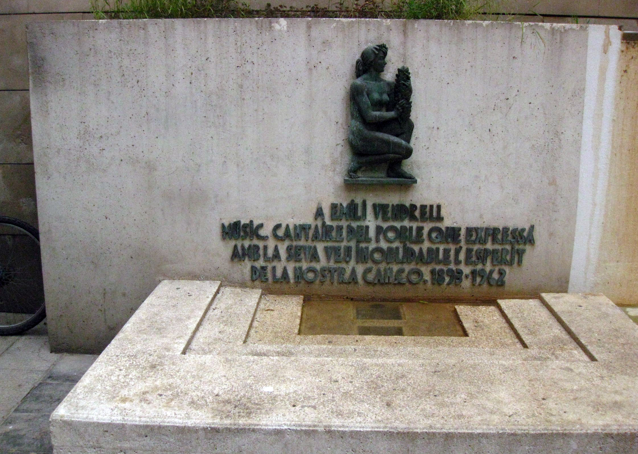 A Emili Vendrell (Rafael Solanich). Pl. d'Emili Vendrell (Barcelona)